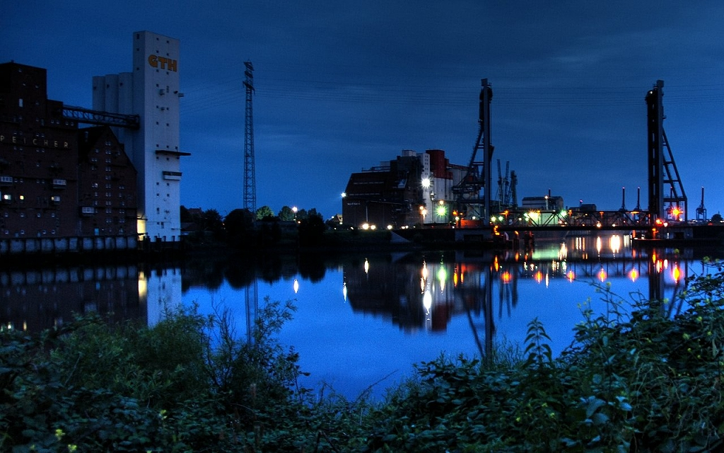 Rethebrücke